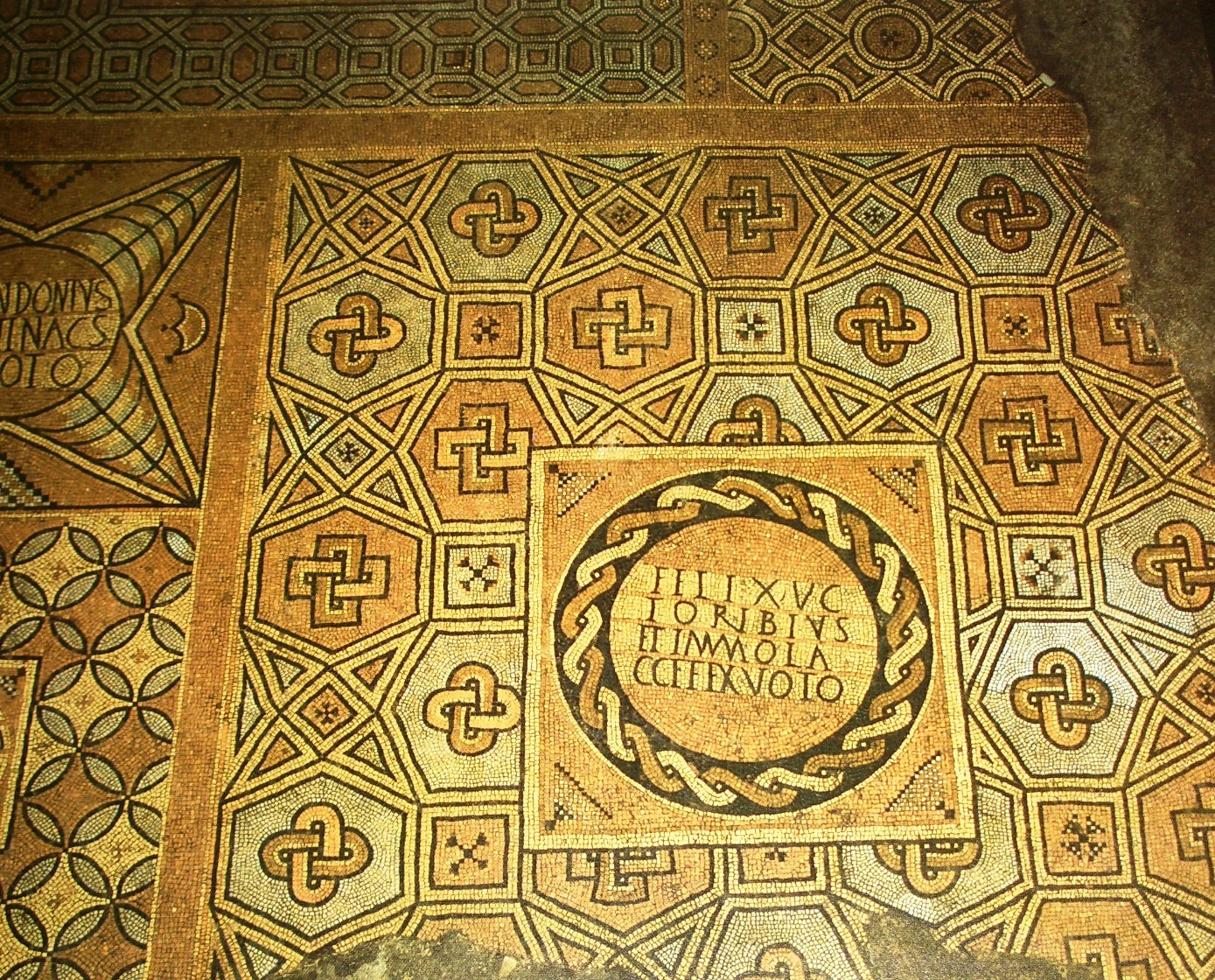 mosaico centrale della Basilica dei Santi Felice e Fortunato (Vicenza)